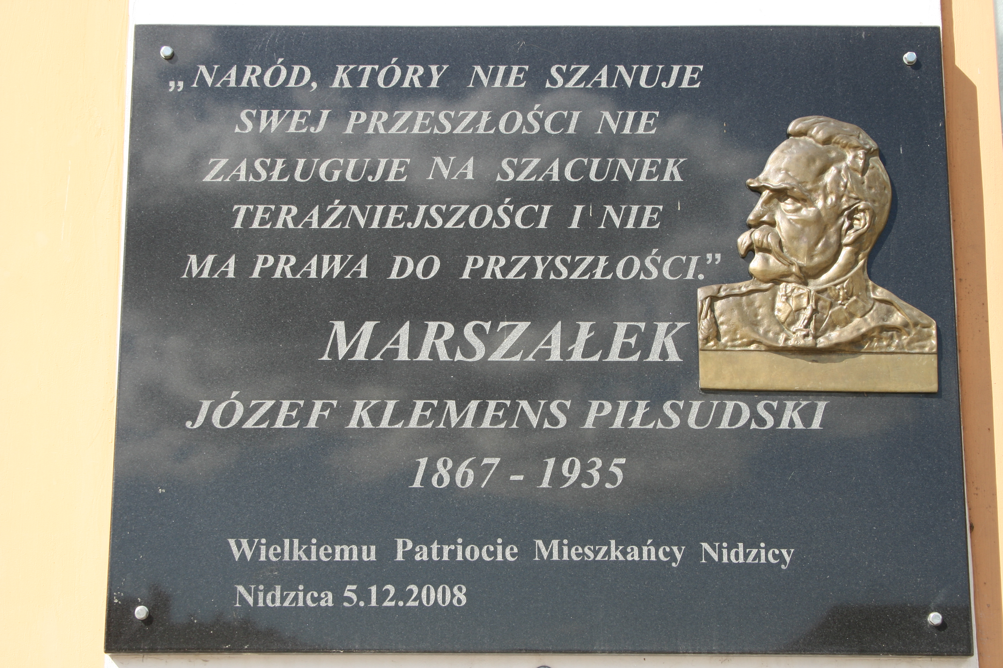 Nidzica, ratusz, po 1828, 1923-1924